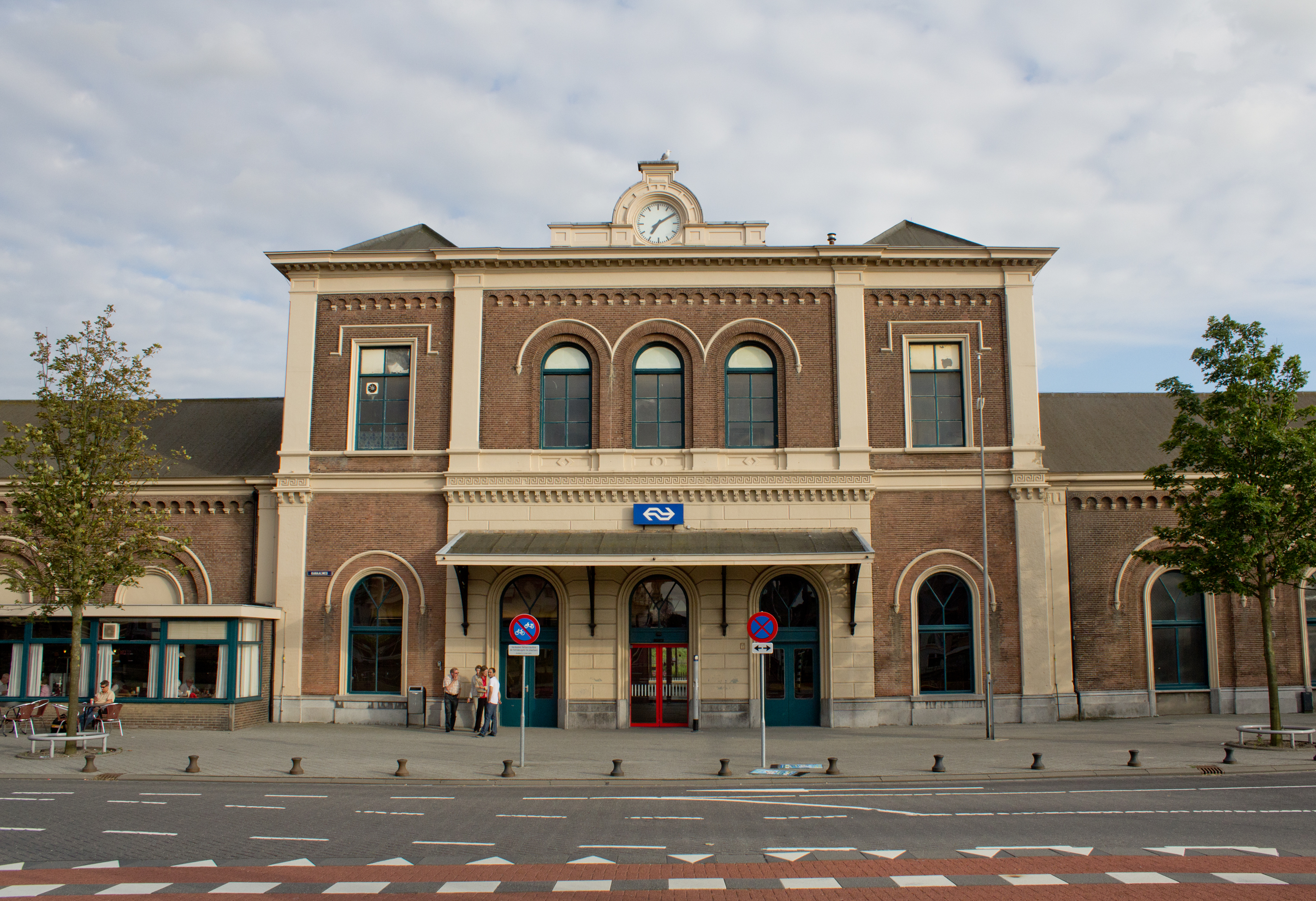 Station Middelburg.